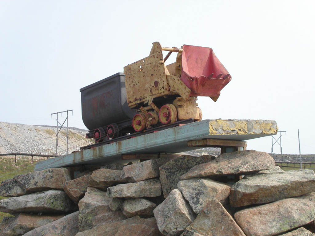 Памятник на везде в поселок Валькумей